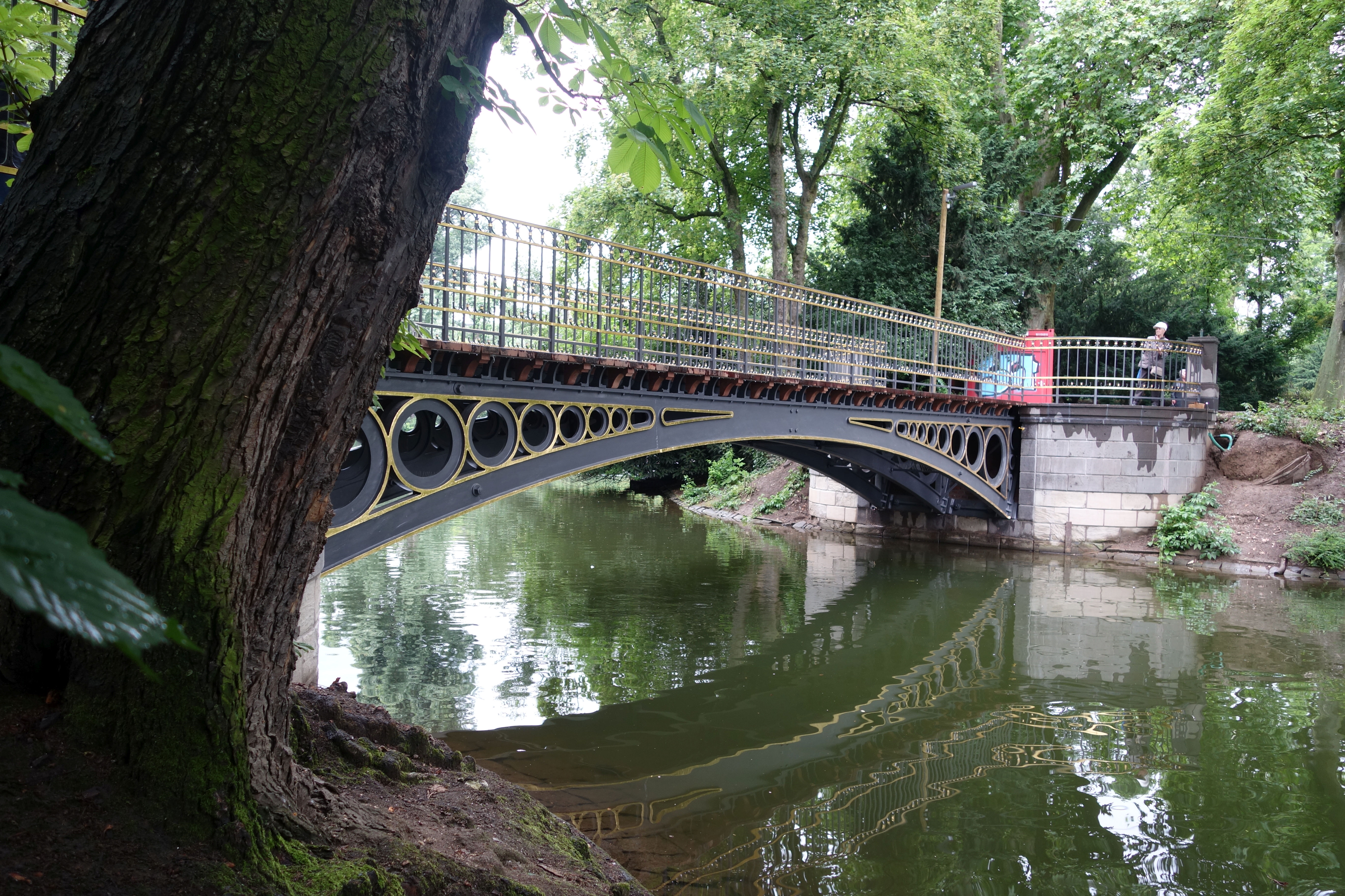 Goldene Brücke im Düsseldorfer Hofgarten, nach Ende der Renovierung, Juni 2016.